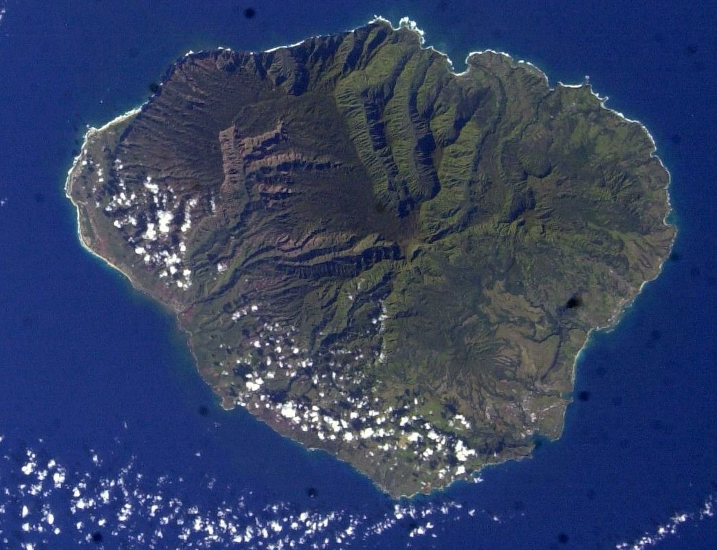 Hawaii Archipel. Nihauu "the forbidden Island" rechts neben dem größeren Kauai. Achtung: Auf diesem Bild ist der Norden unten.